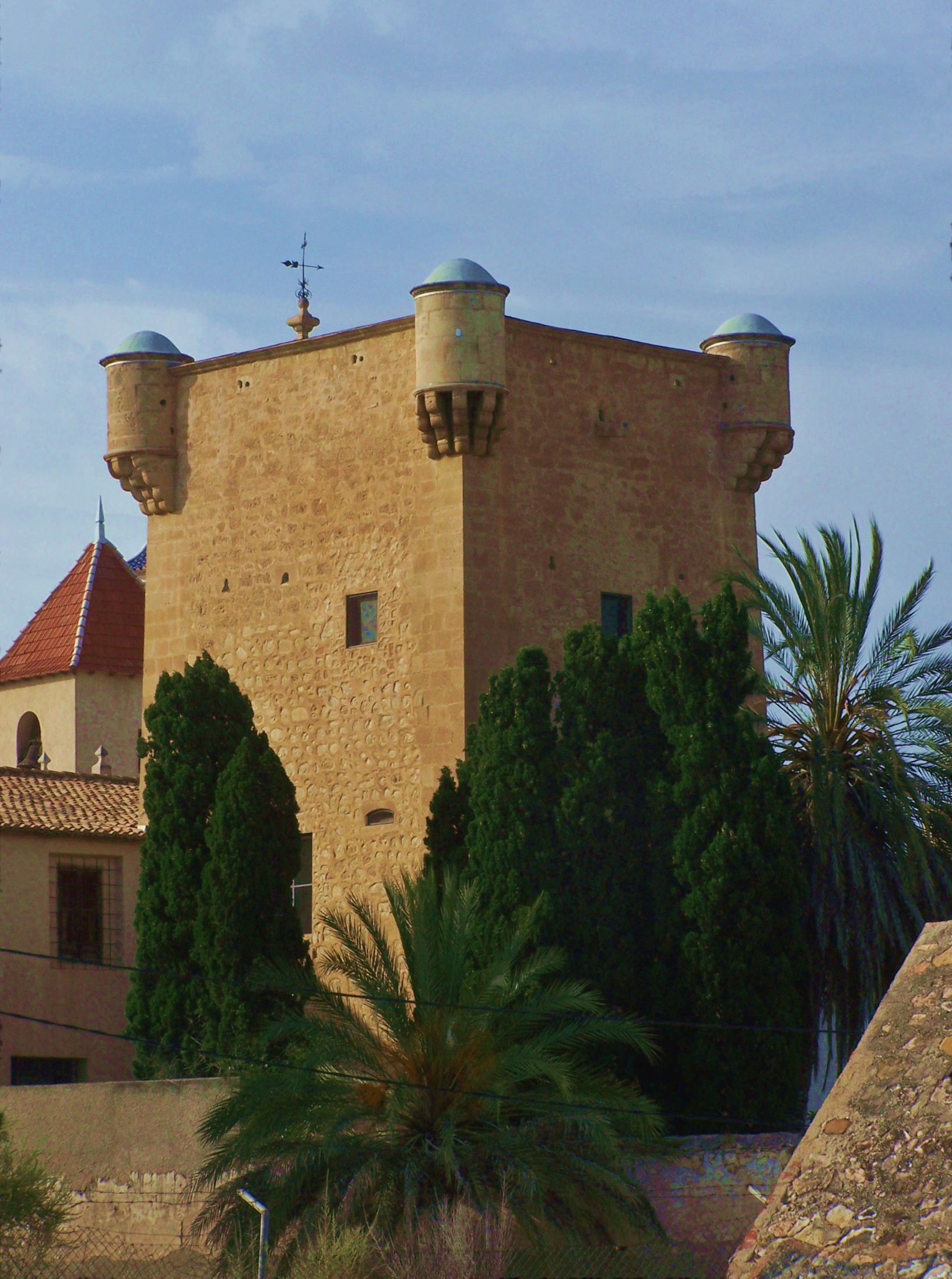 Torreó de la Santa Faç